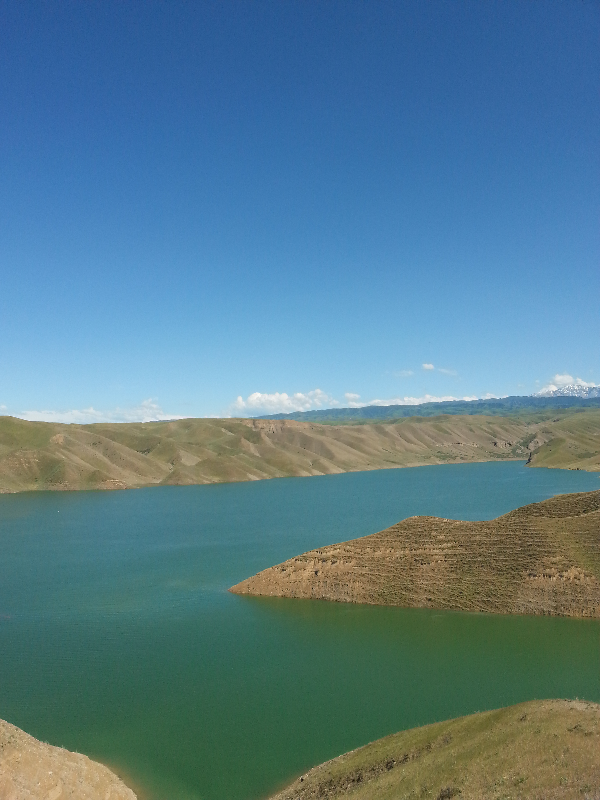 Джизакское водохранилище